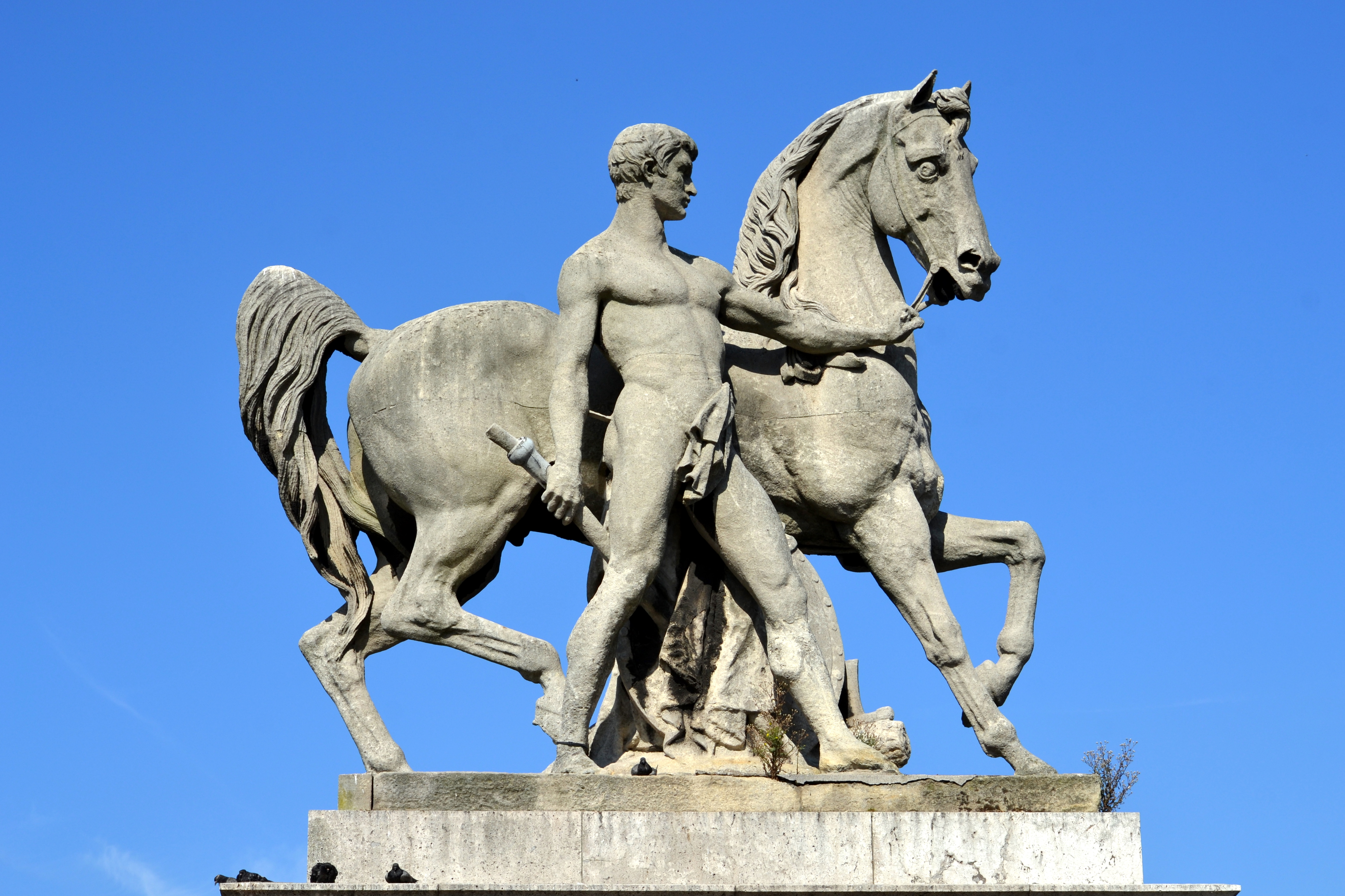 Le Cavalier romain, par Louis Daumas.